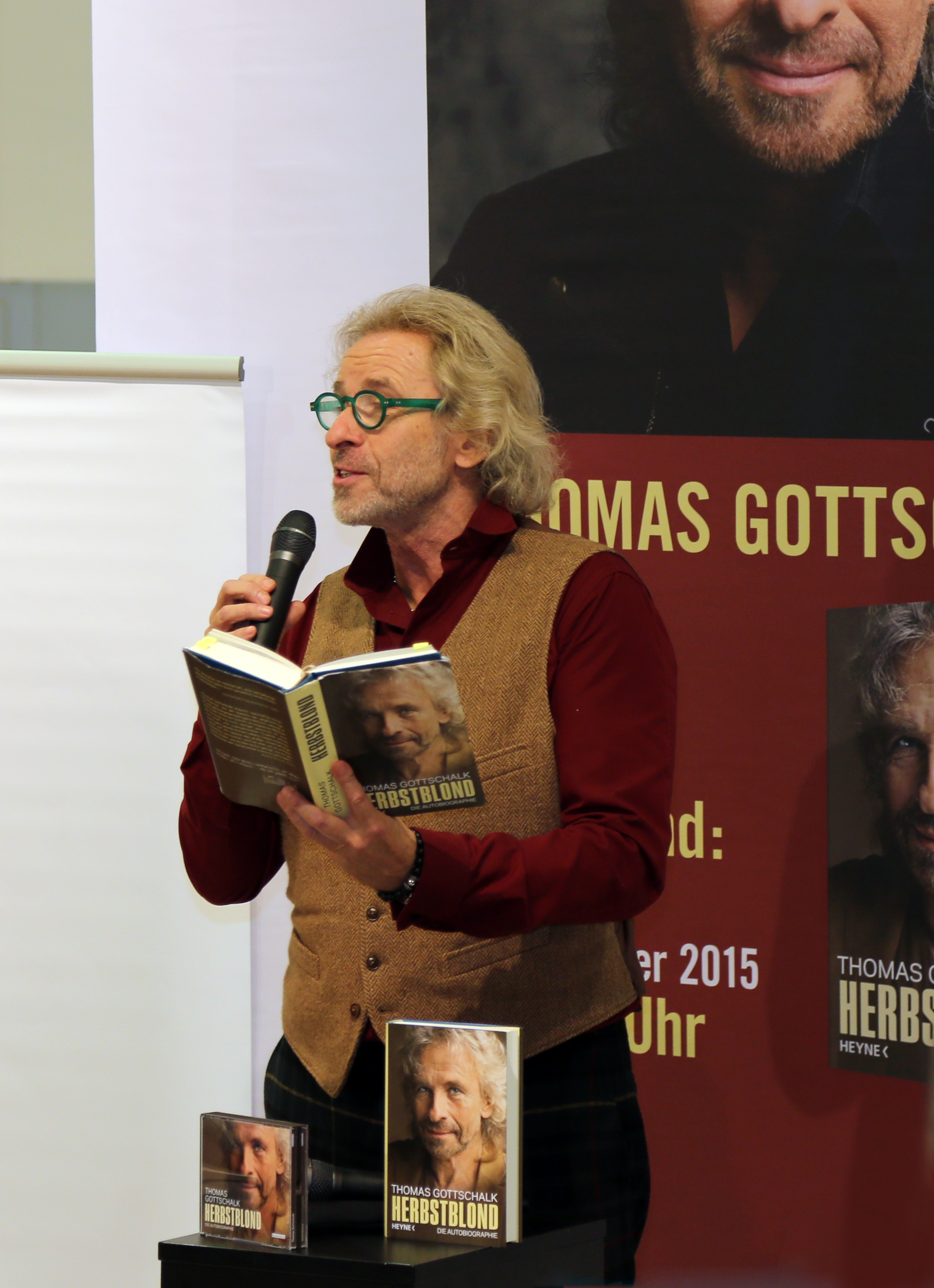 Thomas Gottschalk bei der Frankfurter Buchmesse 2015